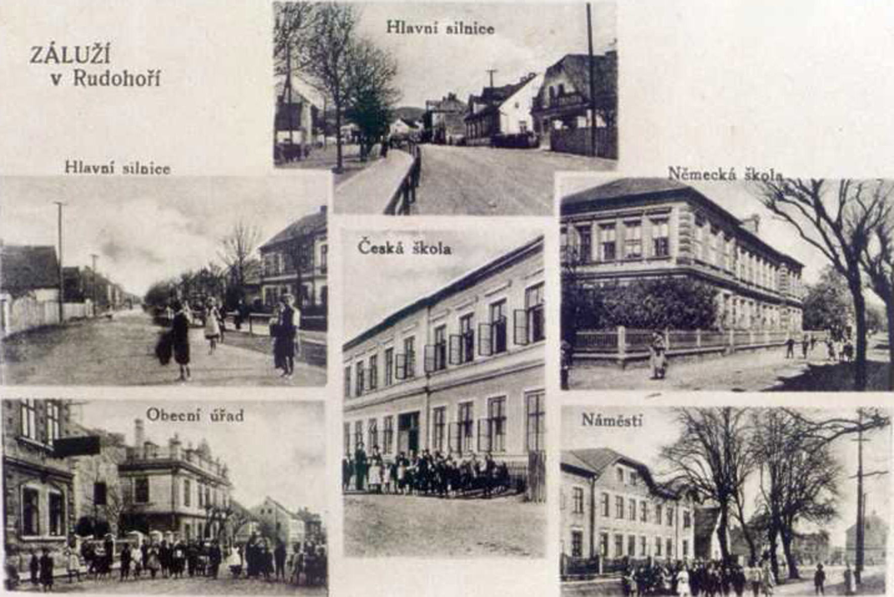 Ehemaliges Dorf Maltheuern (Záluží) bei Brüx (Most)